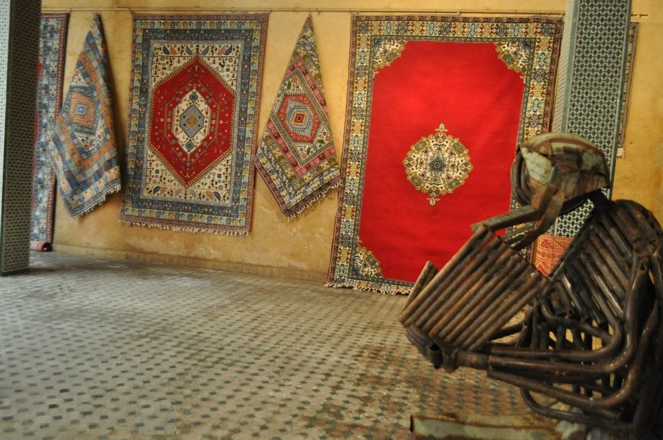 Musée Bab Lekhmiss Salé